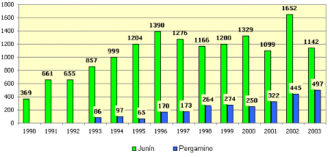 Germán Ramos.